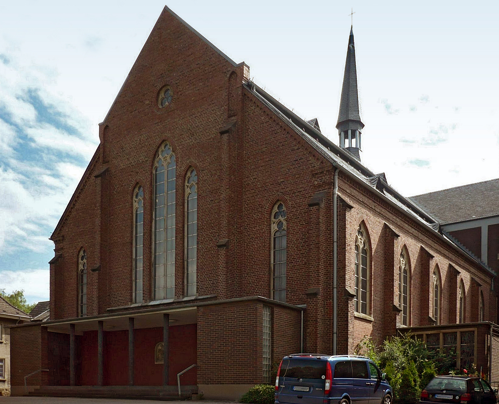 Kirche St. Josef in Essen-Kupferdreh